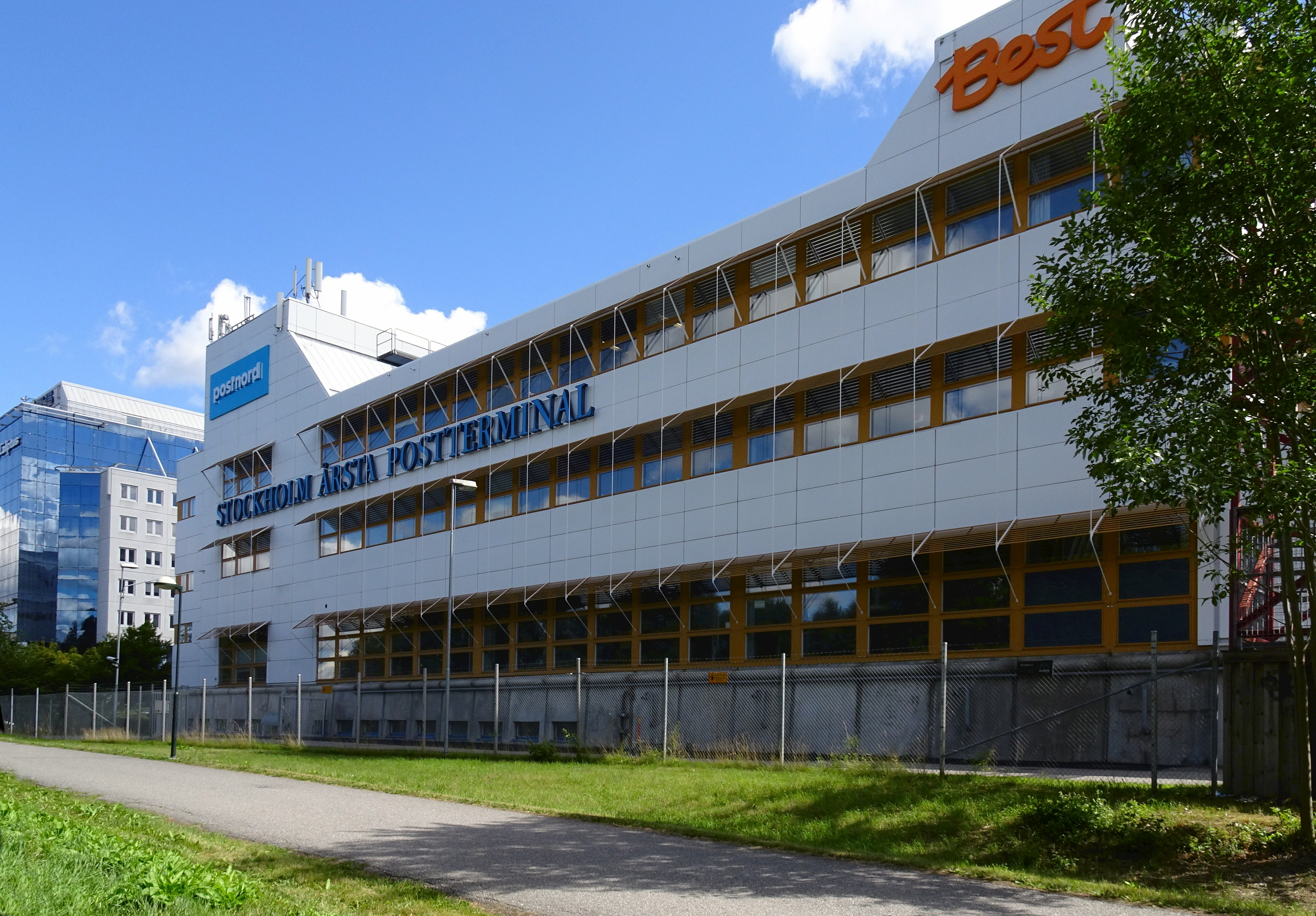 Årsta Park Företagsområde, Enskedefältet, Stockholm Årsta postterminal